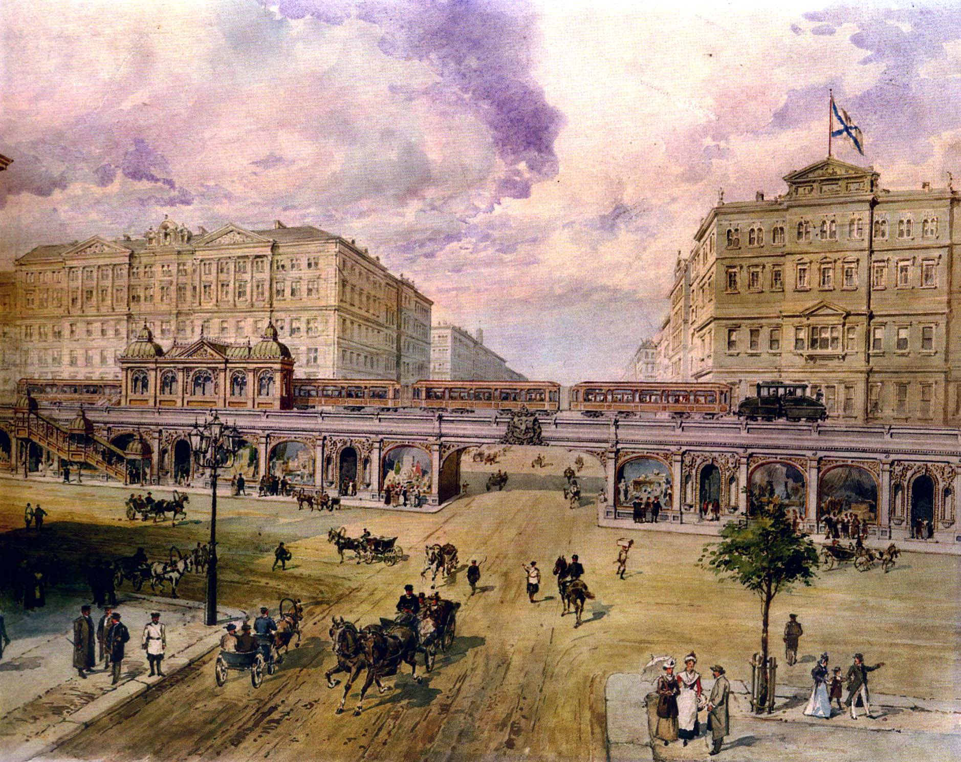 Вид эстакады надземного метрополитена для г. Санкт-Петербурга